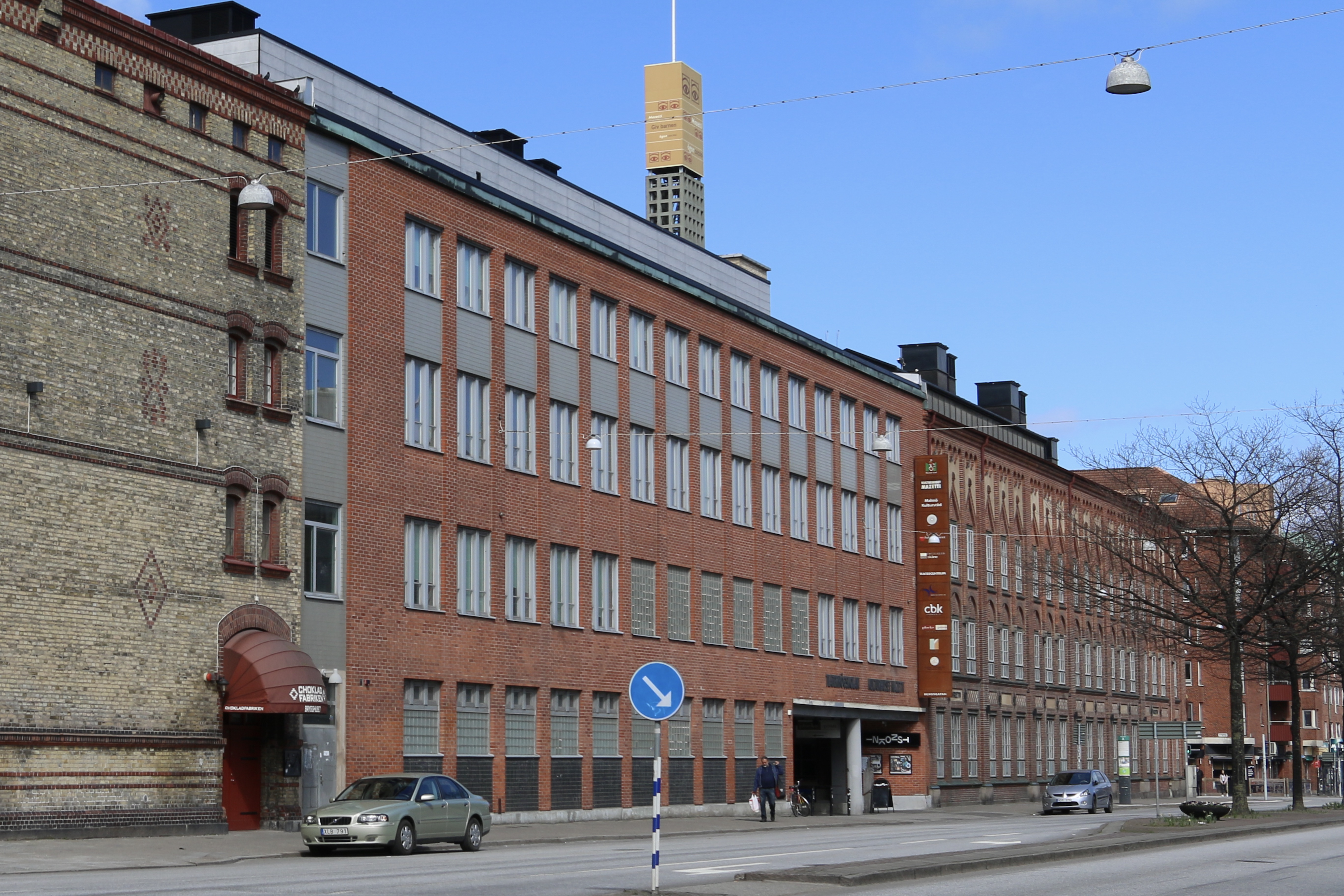 Teaterhögskolan, Malmö 2017